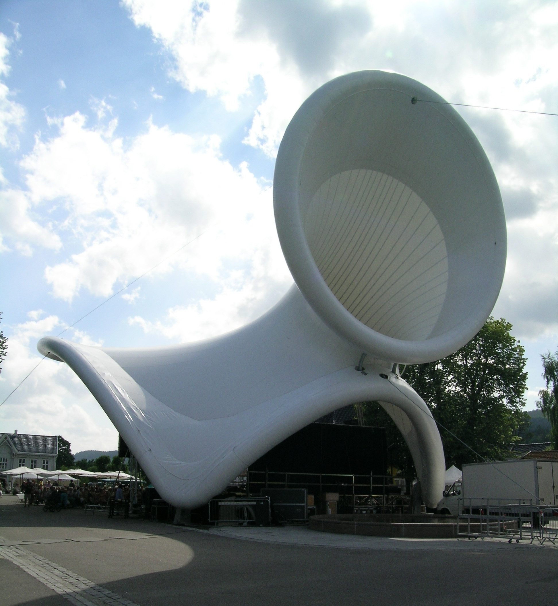 Snøhetta: Kongsberg outdoorscene («Tubaloon»). Opened 2006. Kongsberg, Norway.